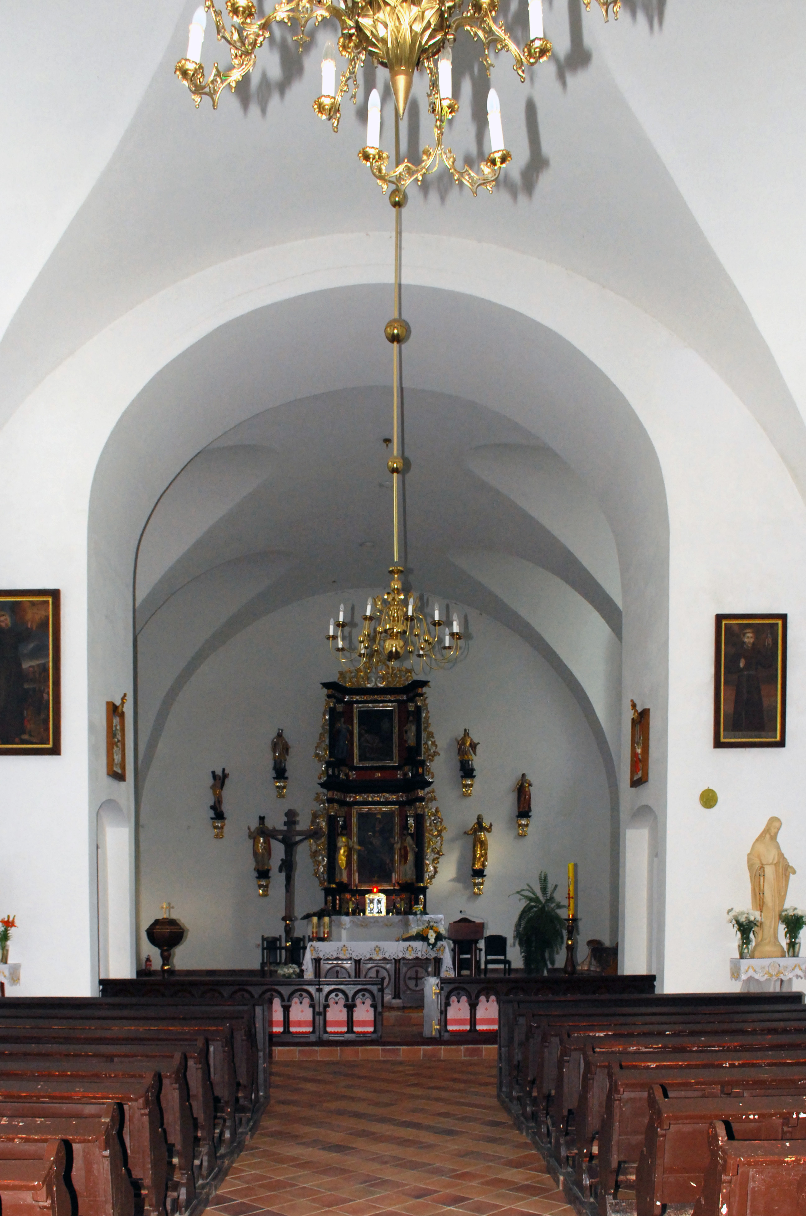 Zespół klasztorny franciszkanów w Kadynach, wnętrze kościoła.